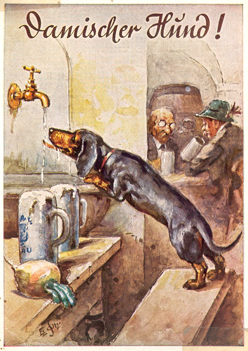 Humor-Karte, Münchener Bildkunstverlag August Lengauer, München, ca. 1935, Privatbesitz